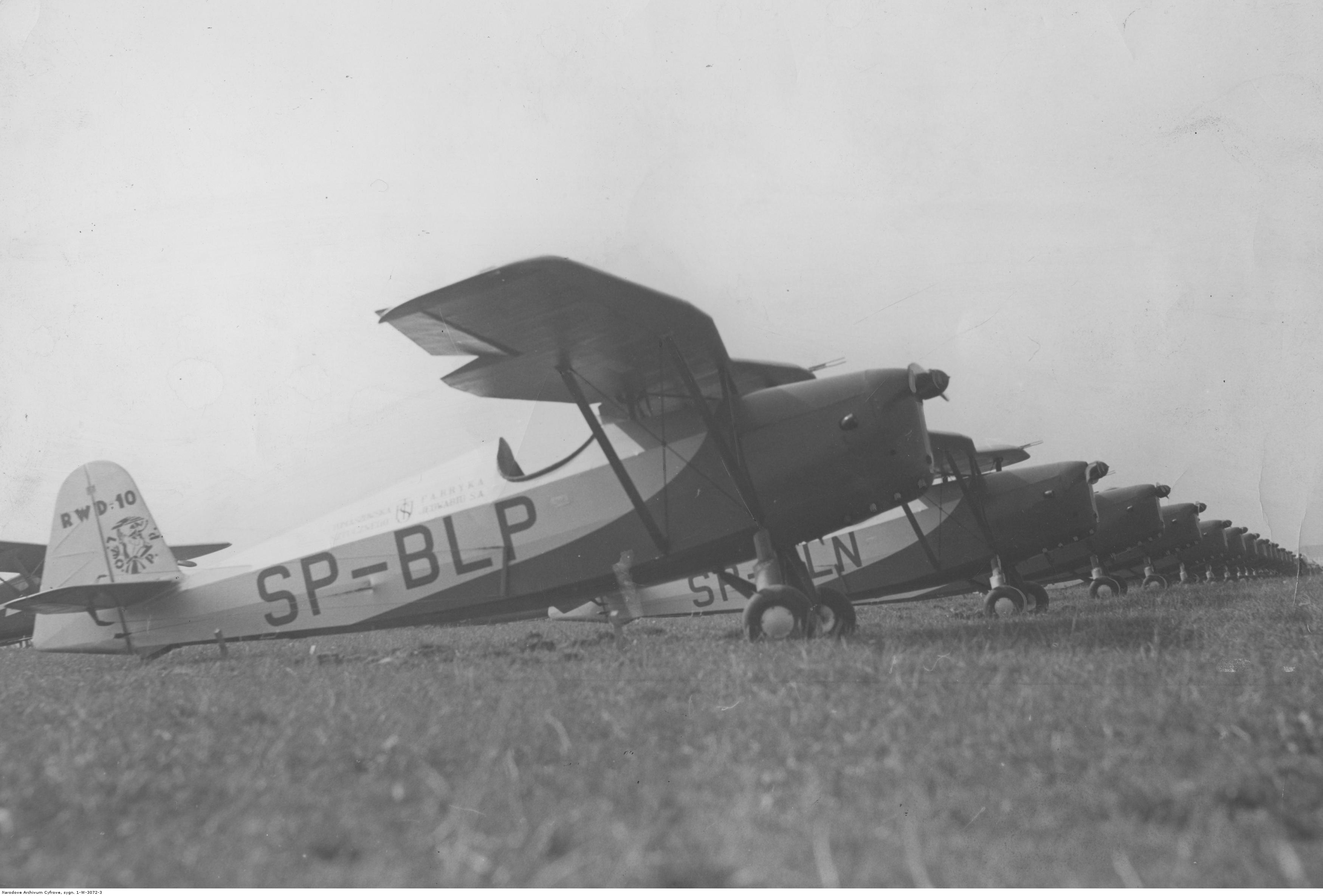 Przekazanie wojsku 130 samolotów, ufundowanych przez Ligę Obrony Powietrznej i Przeciwgazowej, Samoloty RWD-10 na lotnisku Mokotowskim w Warszawie; widoczny egzemplarz ze znakami SP-BLP. Koncern Ilustrowany Kurier Codzienny - Archiwum Ilustracji. Sygnatura: 1-W-3072-3